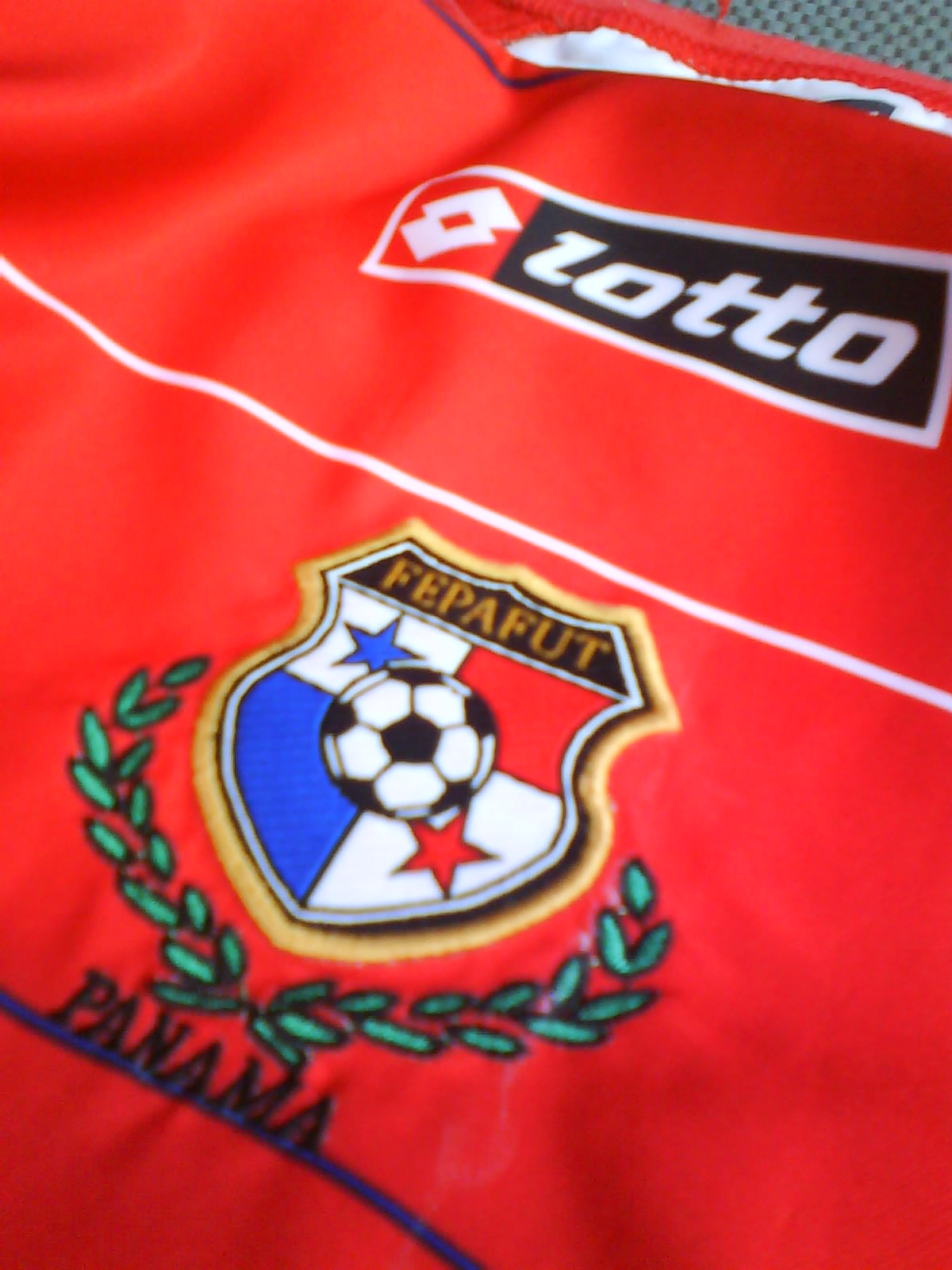 Camiseta de la seleccion de Panamá 2005.